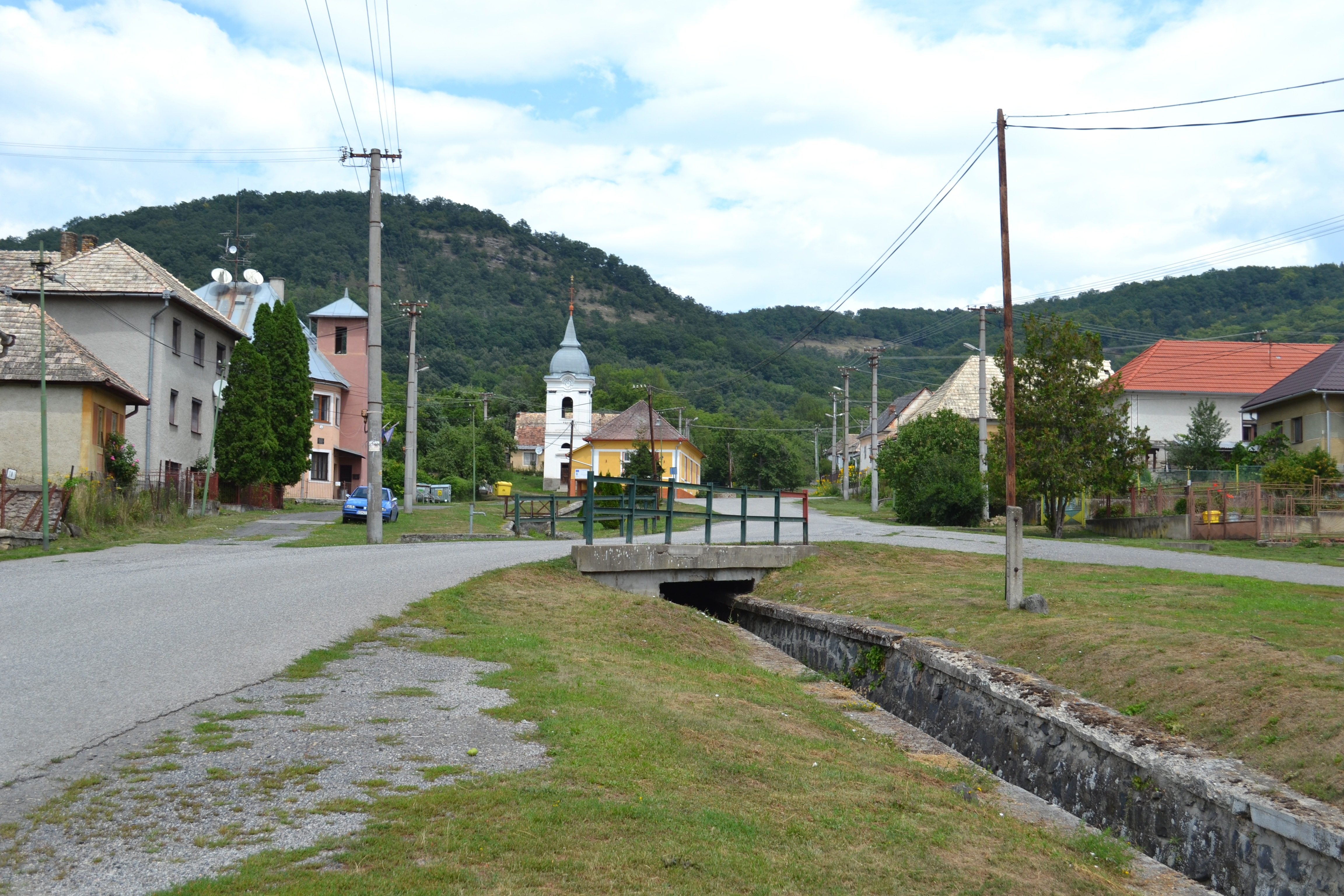 Obec Hostišovce